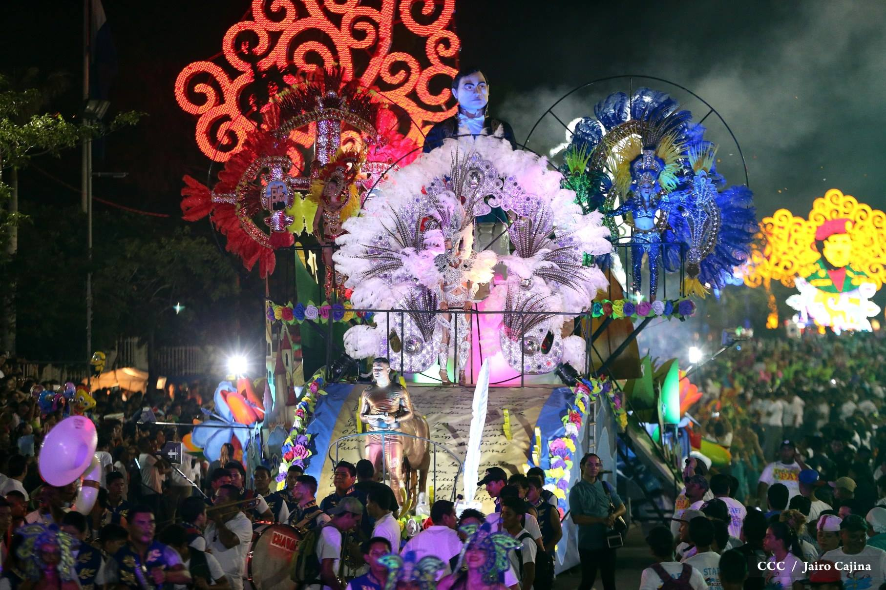 Unos de los carnavales mas famosos de la region lleno de bailes, presentaciones artísticas, carrosas cultura de Nicaragua y otras naciones